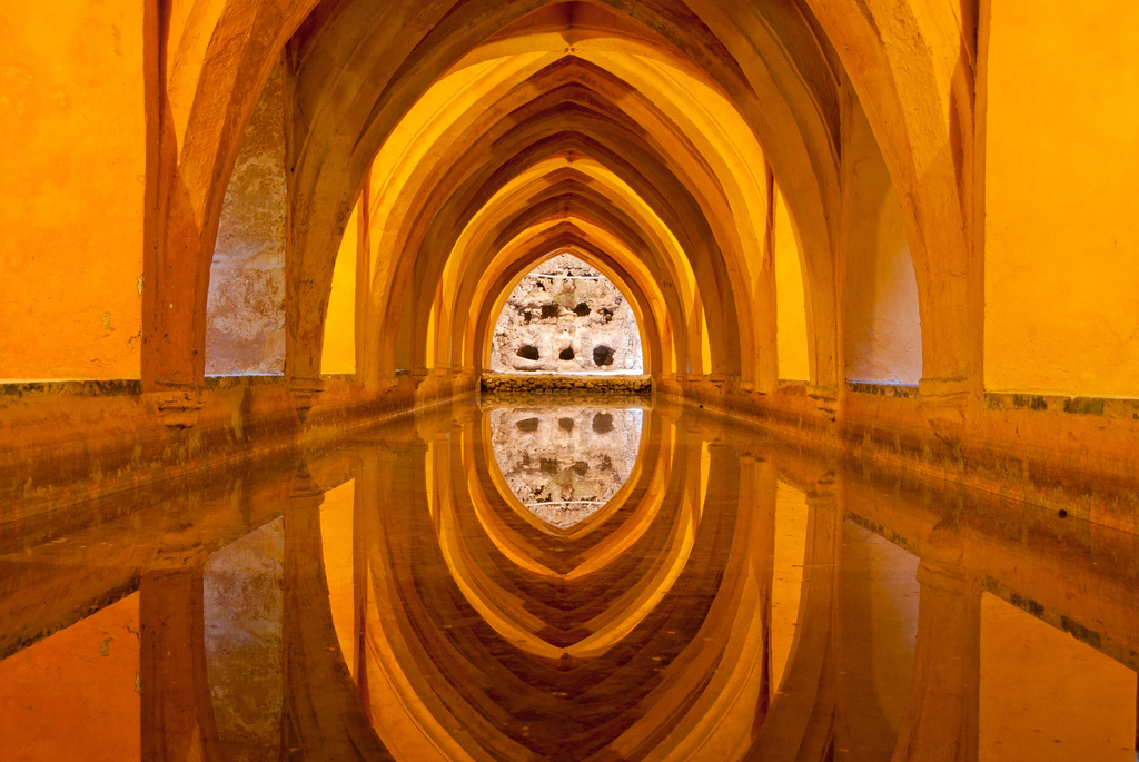 MAS FOTOS: Los Reales Alcázares (el Alcázar), Sevilla - Andalucía, España.